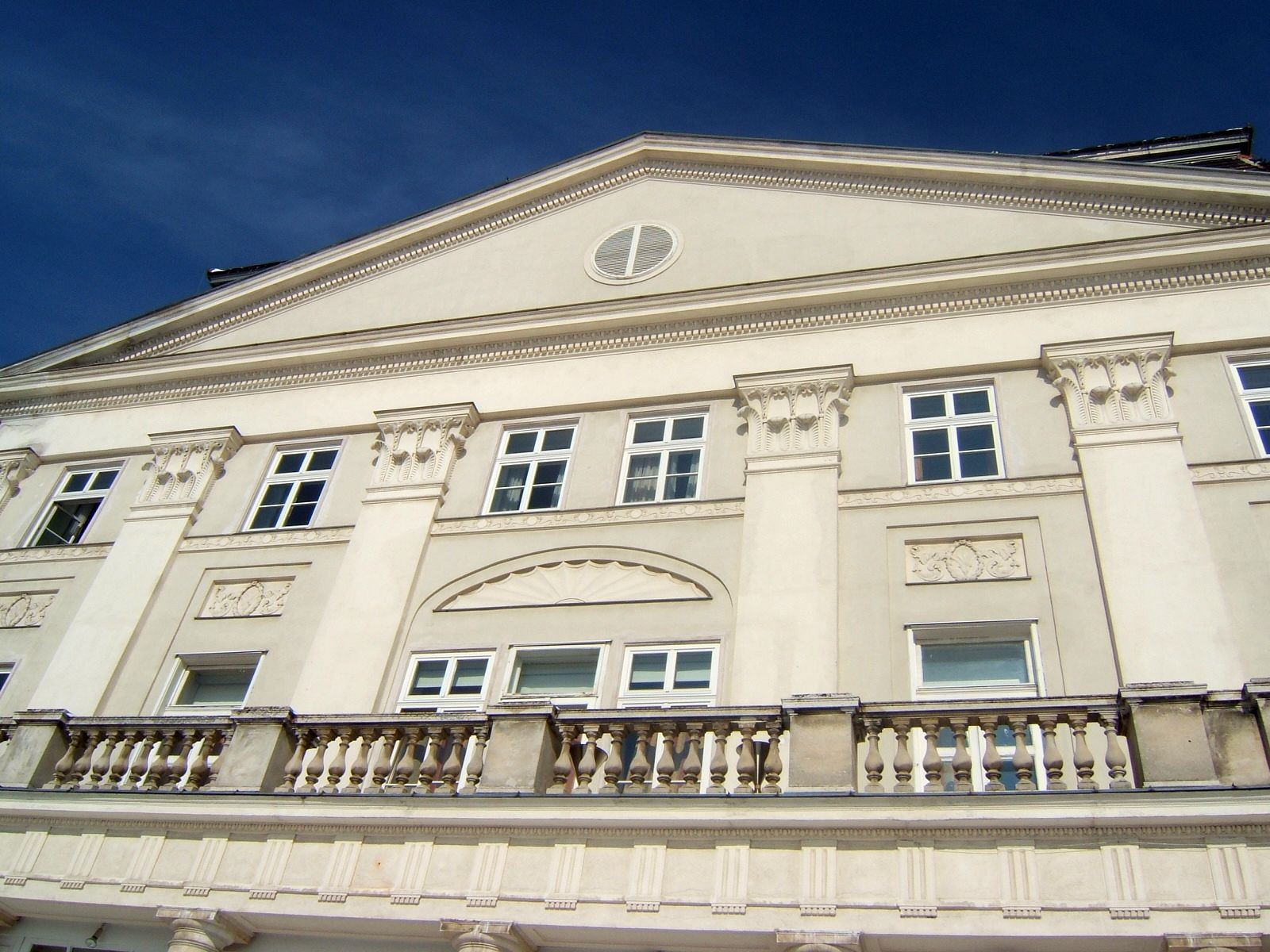 Schloss Wilhelminenberg in Wien (16. Bezirk)